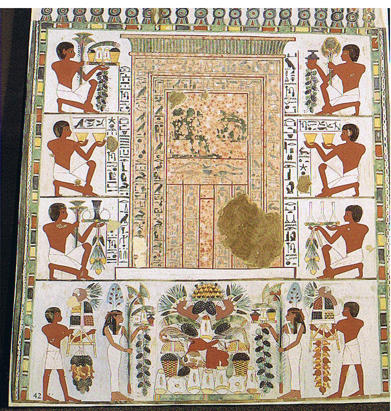 Scheintür